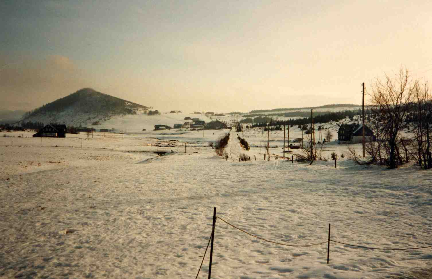 Pohled od Hnojového domu přes Jizerku na Bukovec.